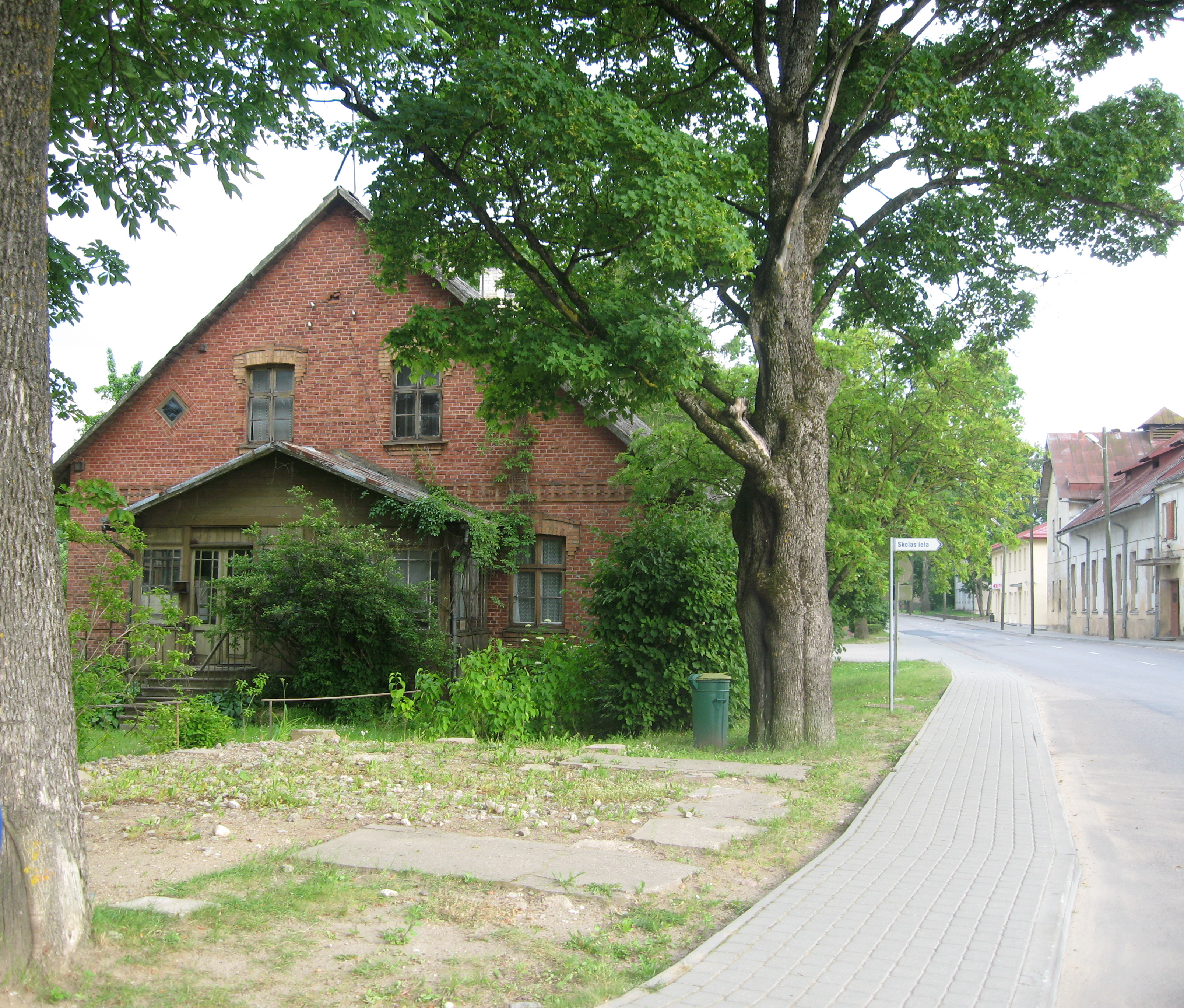 Matisi